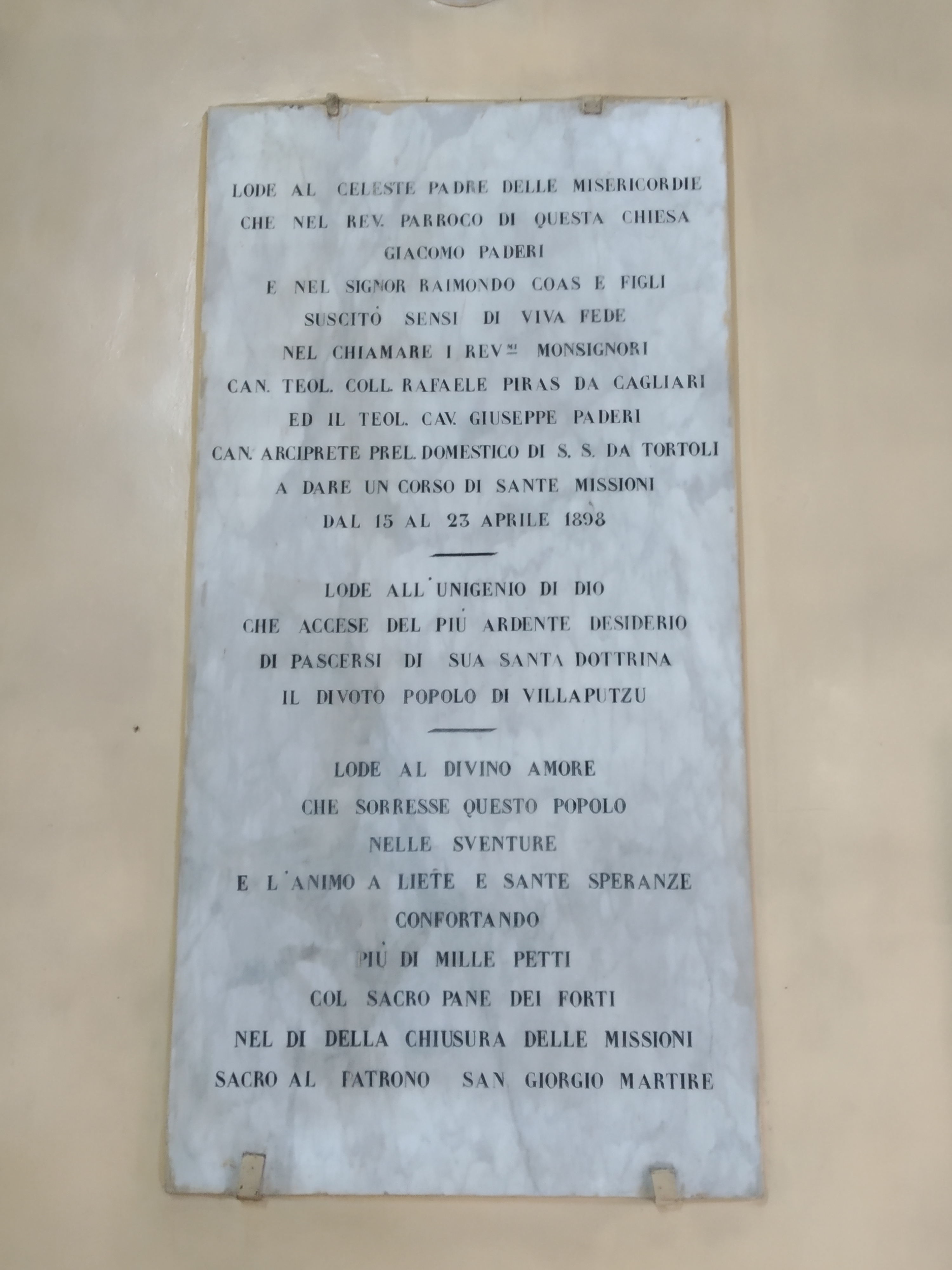 Targa commemorativa delle sante missioni in Villaputzu